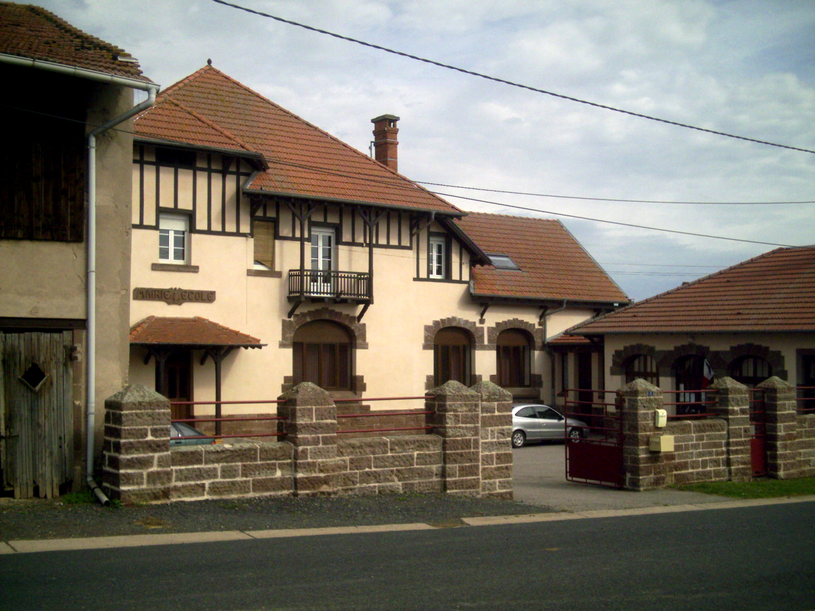 Réchicourt-la-Petite : mairie-école